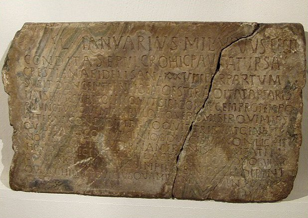 Grabstein der Ursa aus der Archäologischen Sammlung des Stadtmuseums Wels